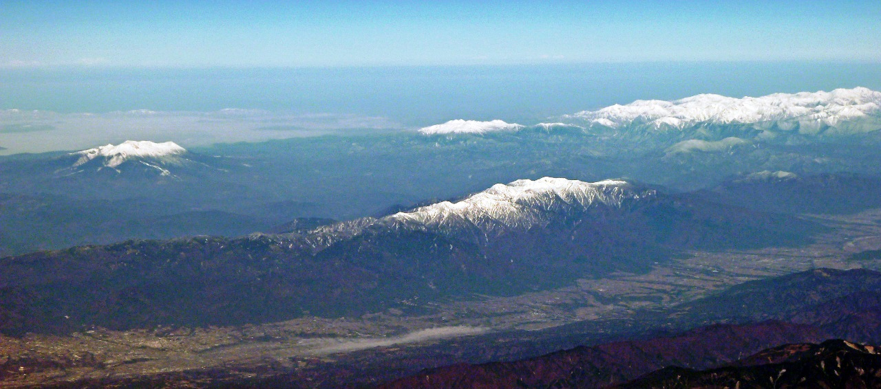 木曽山脈と手前・伊那谷、雪を頂いた奥側の山は左から順に御嶽山、乗鞍岳、北アルプスを空撮。